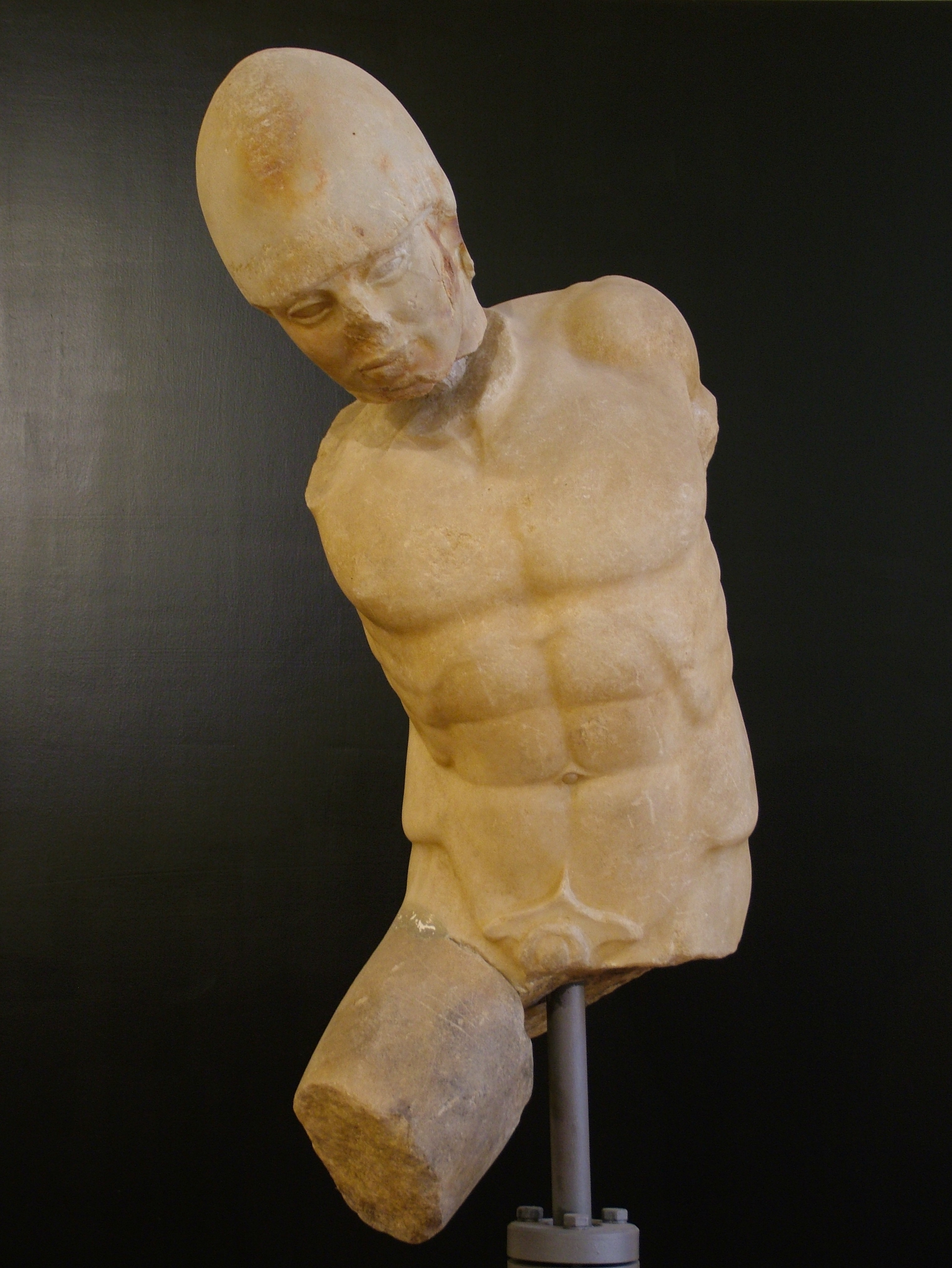 Agrigent, Sizilien, Archeologisches Museum, Torso eines Kriegers, 480 - 475 v. Chr. (BC), Fundort Zeus-Tempel (Kopf), Tempel der Herakles (Rest), die Staute wurde 1970 wiederhergestellt.